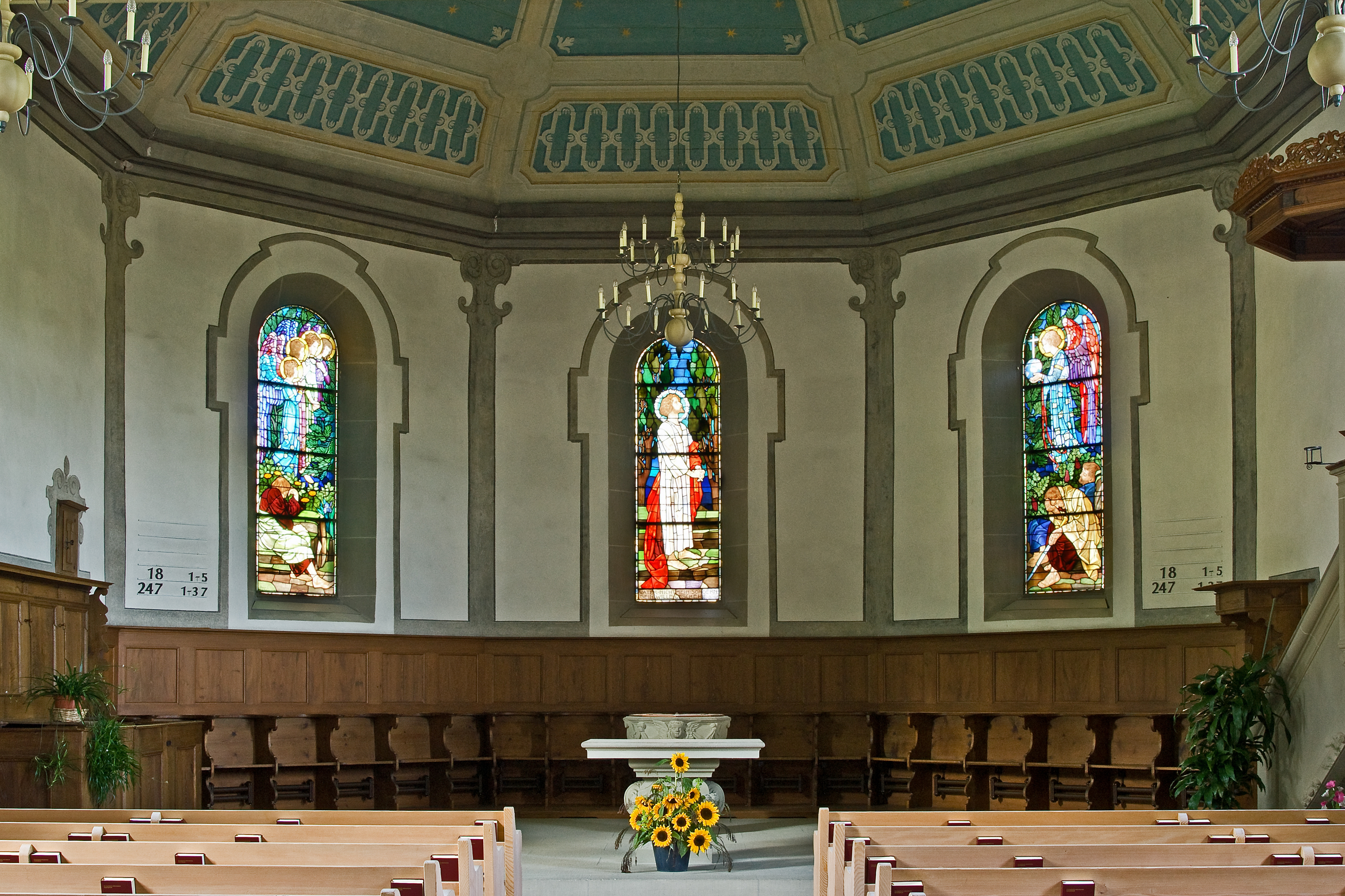 Innenraum der Reformierten Kirche Heimiswil Kt. Bern